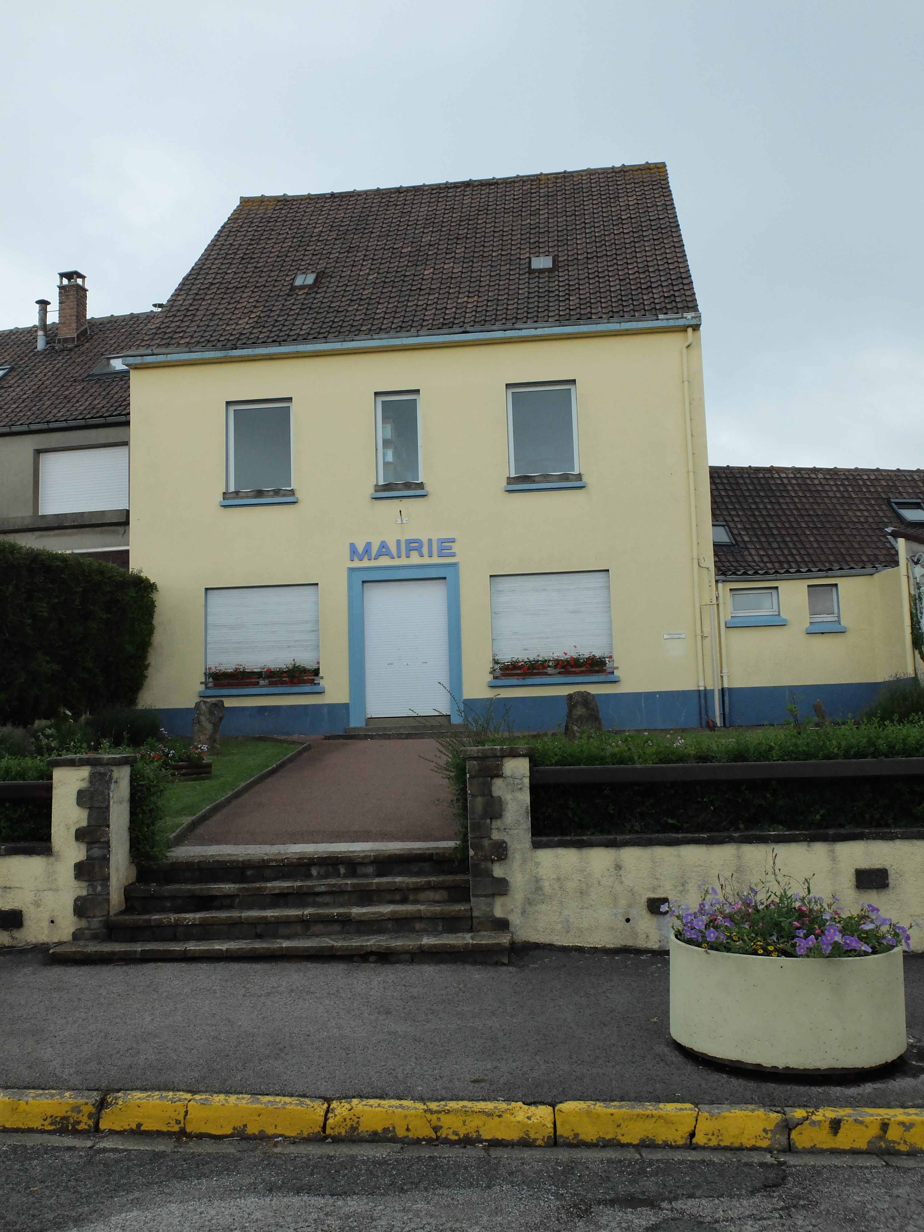 Vue de la mairie de La Capelle-lès-Boulogne.